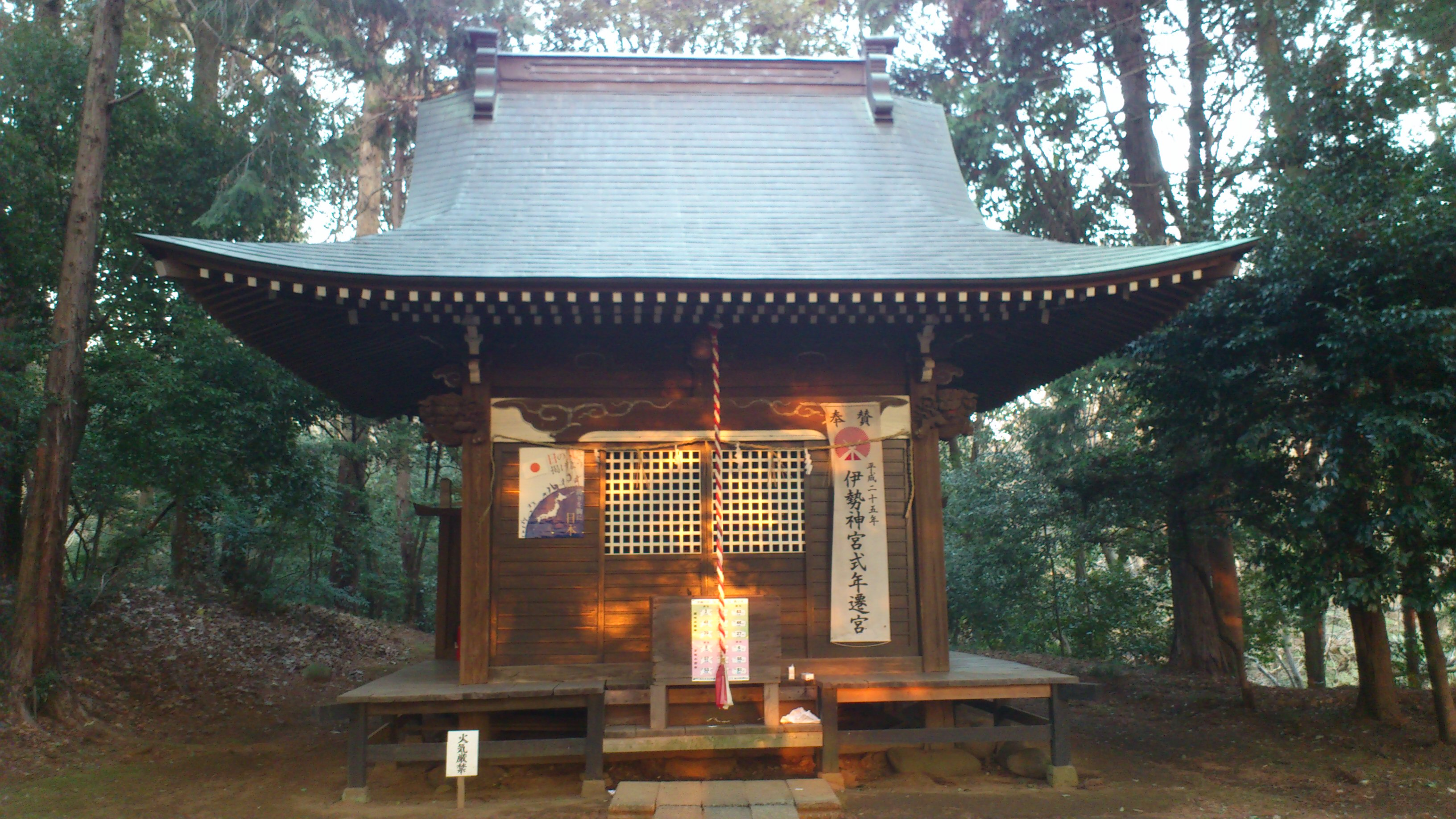 神奈川県相模原市南区磯部にある石楯尾神社。延喜式神名帳に記載の式内社「高座郡石楯尾神社」（相模国式内社）の論社の一つ。